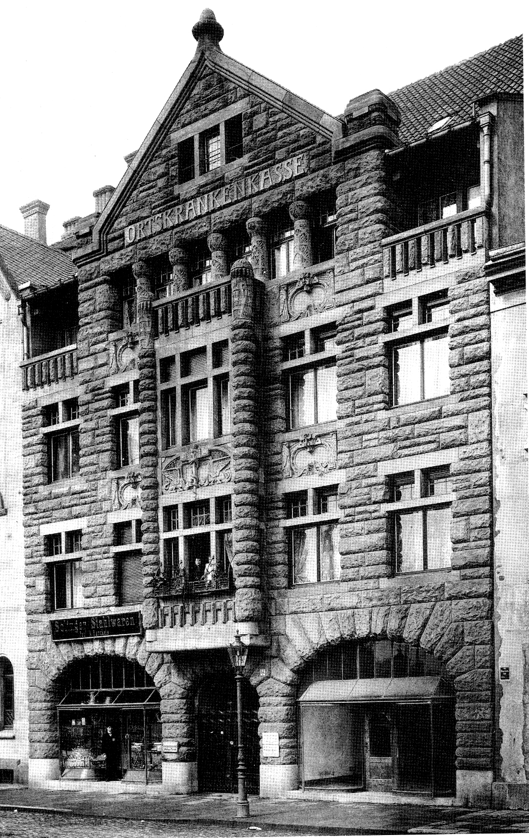 Altes AOK-Verwaltungsgebäude an der Kasernenstraße 67 A, Architekt H. vom Endt, Düsseldorf